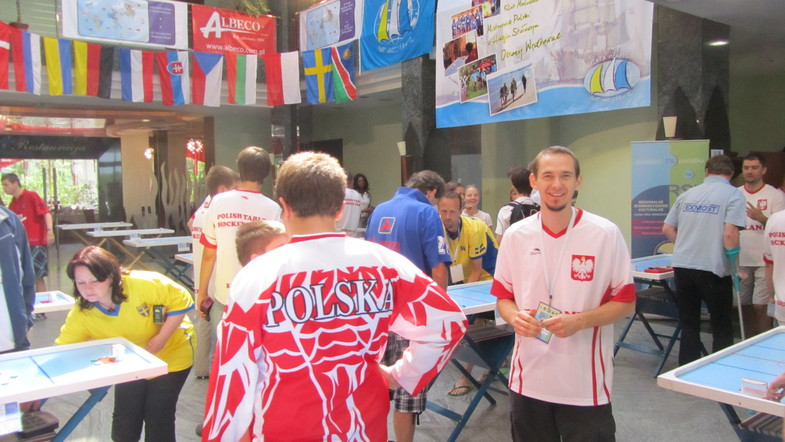 игроки сб. Польши на 3м Чемпионате Мира WTHA